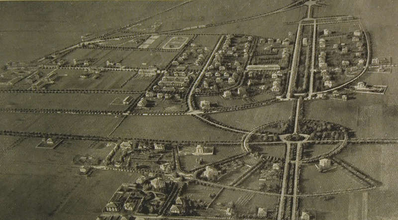 Veduta di Milanino